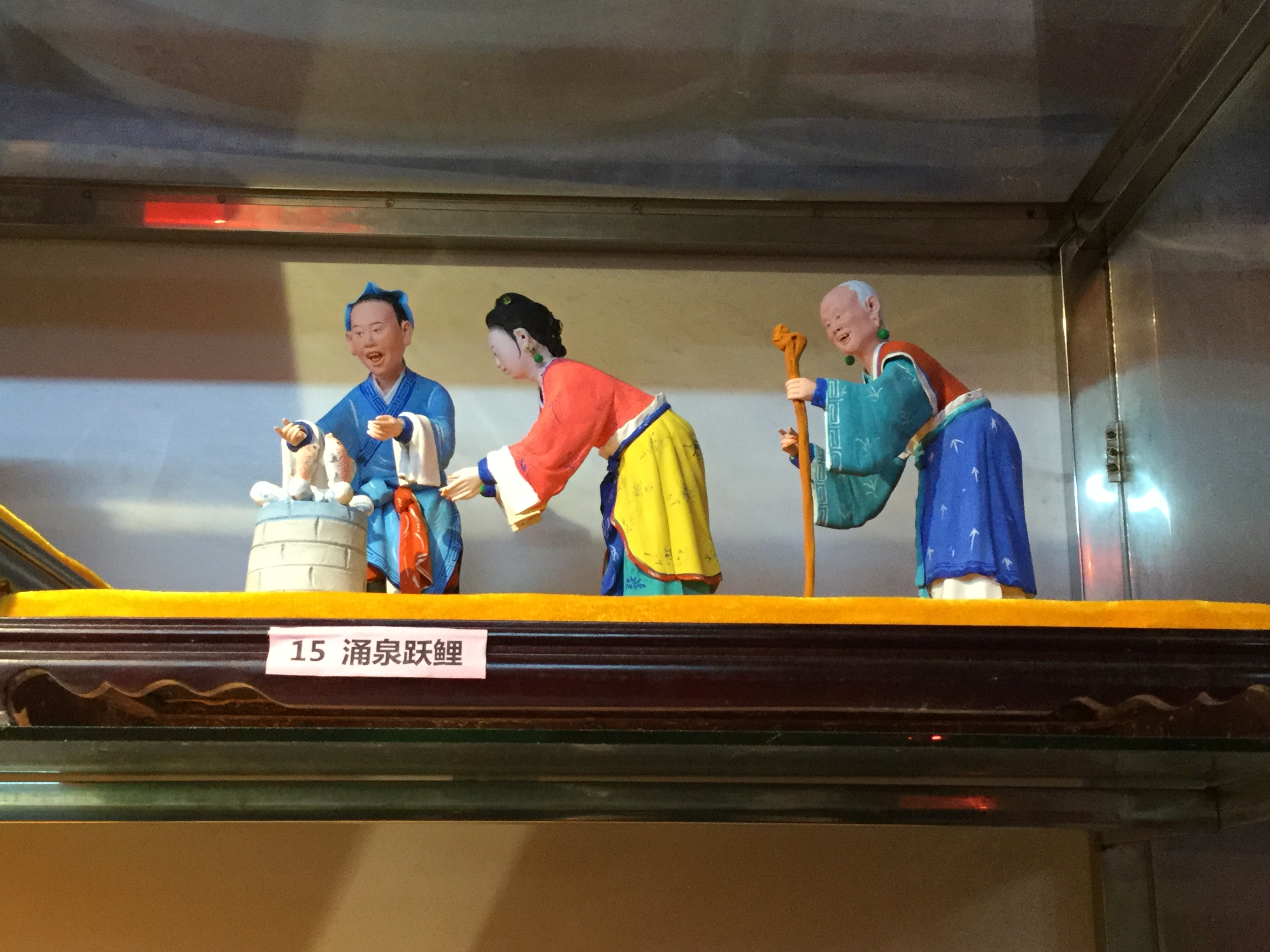 翁仔灯《涌泉跃鲤》，摄于2018年3月2日。